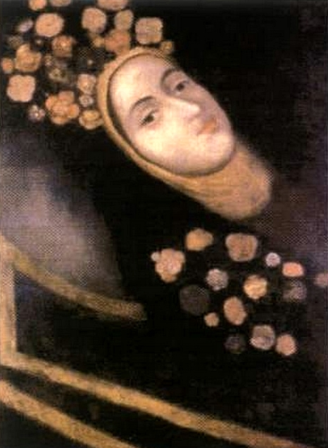 Retrato de la monja muerta Jerónima Nava y Saavedra (Tocaima, 1669-Bogotá, 1727)